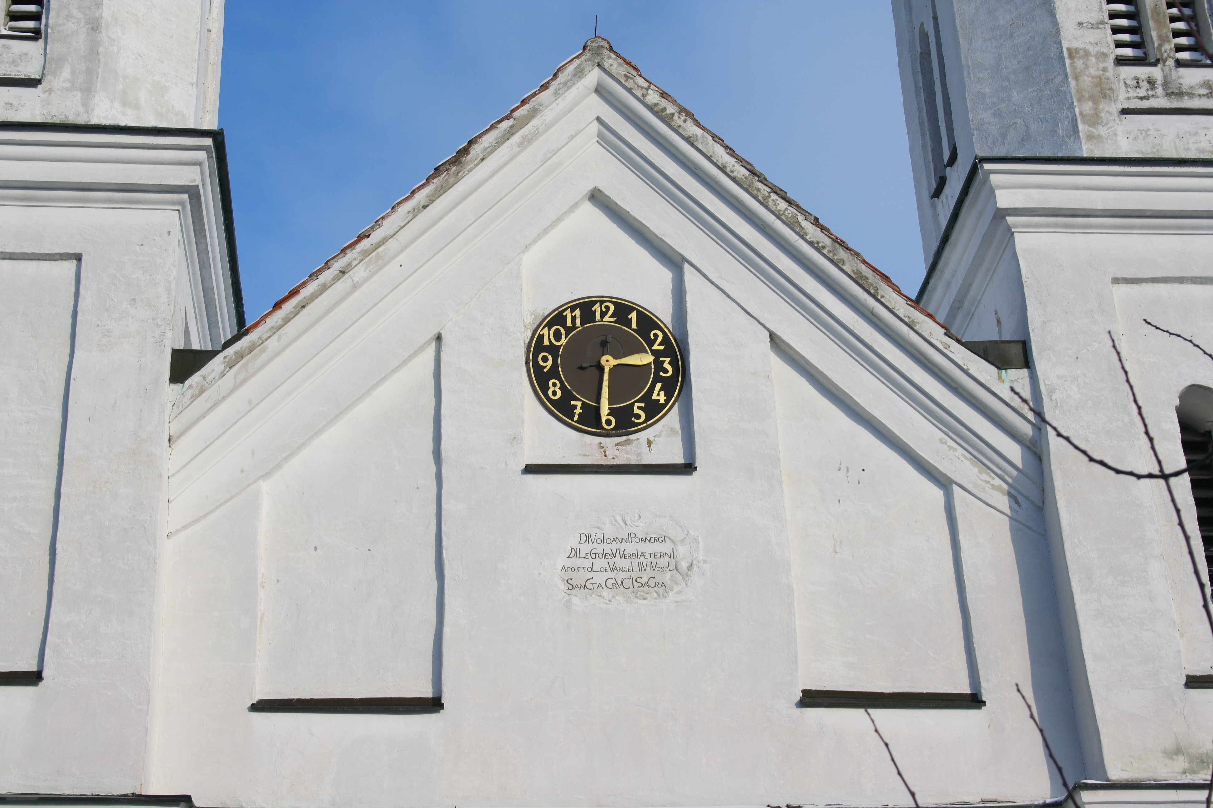 Katholische Pfarrkirche St. Johannes Evangelist in Altenberg (Gemeinde Syrgenstein) im Landkreis Dillingen an der Donau, Westfassade